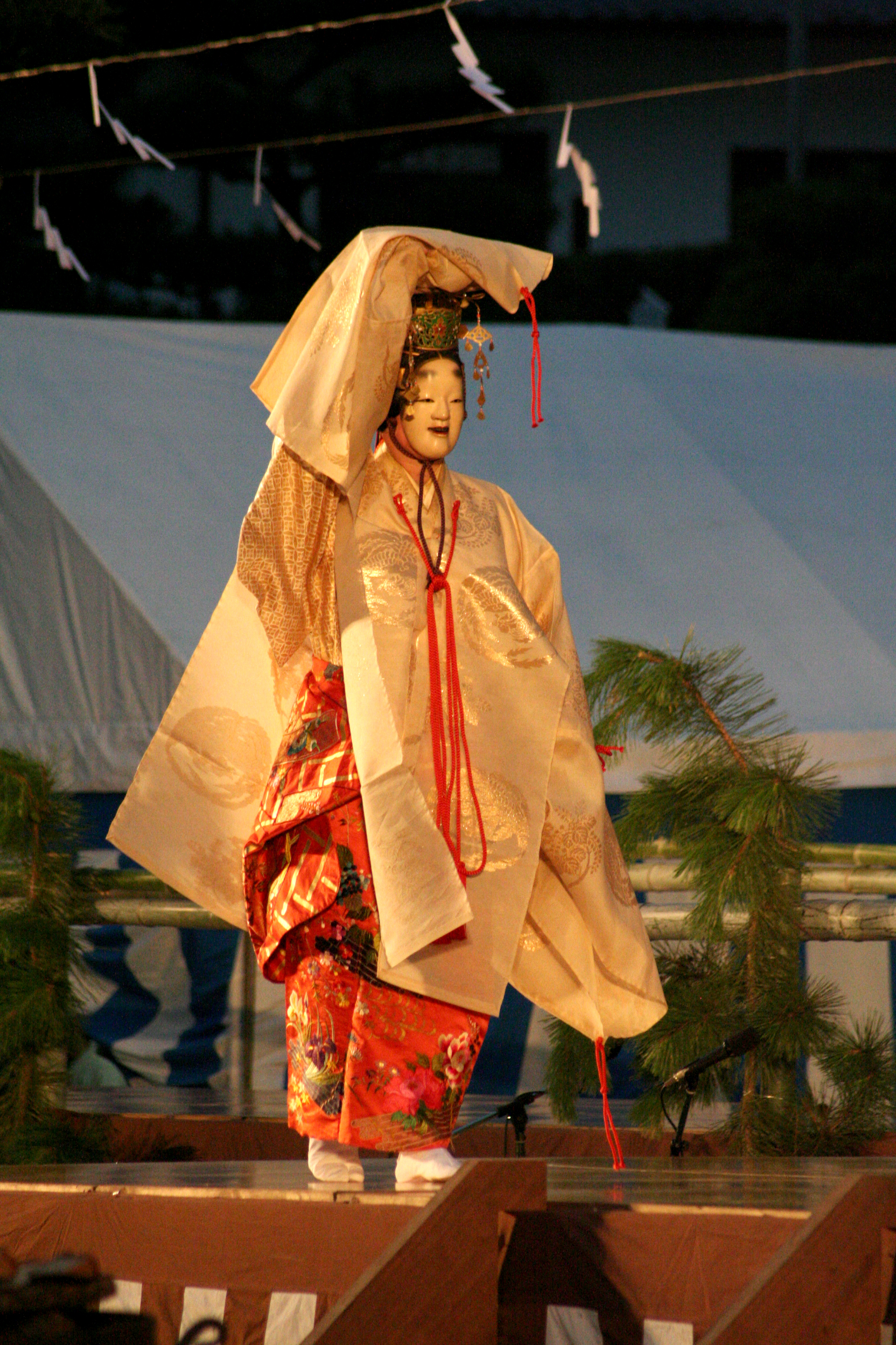 2009年7月31日に姫路城三の丸広場で行なわれた姫路薪能の様子。